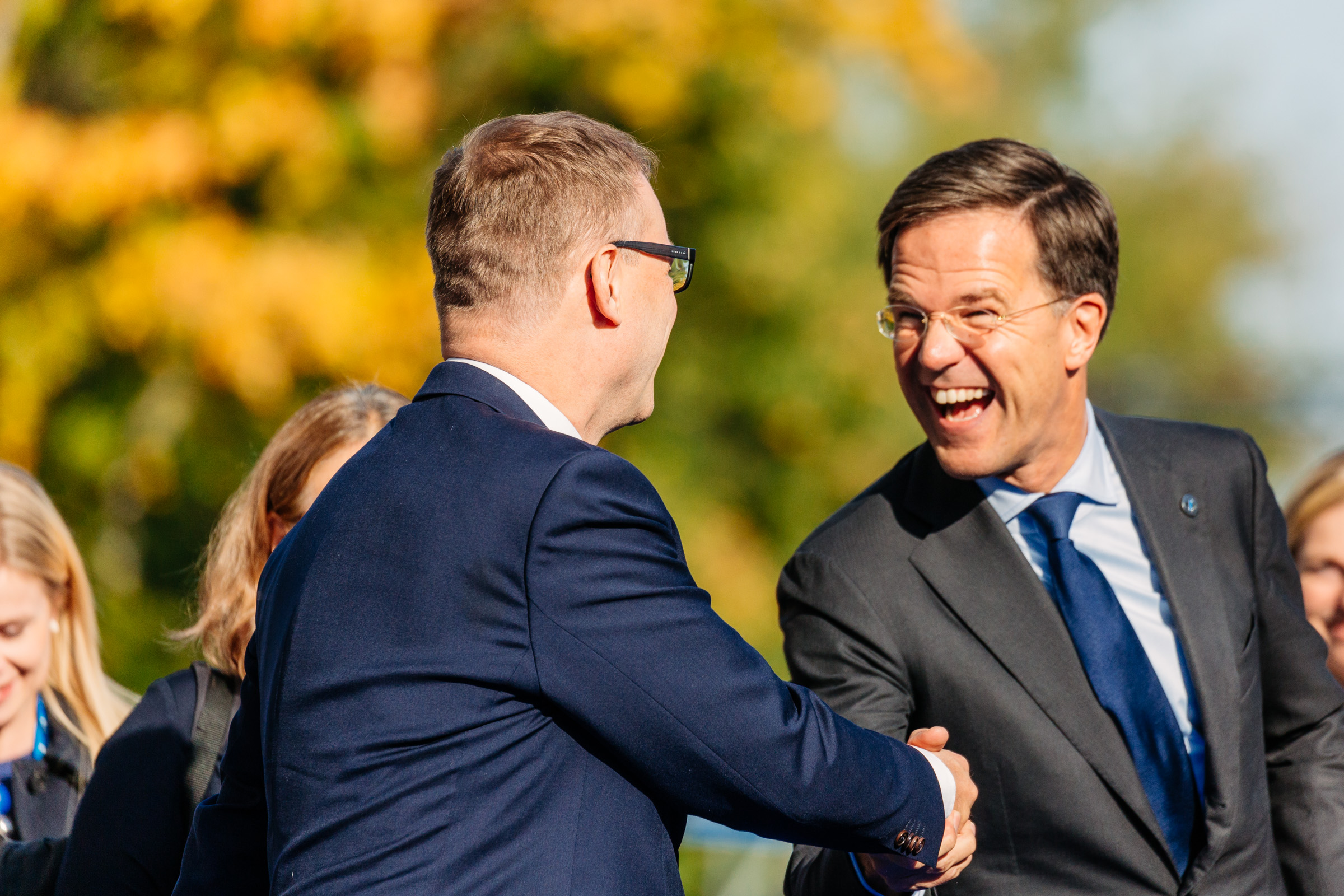 (l-r) Juha Sipilä, Prime Minister, Finland; Mark Rutte, Prime Minister, The Netherlands Photo: Arno Mikkor (EU2017EE)